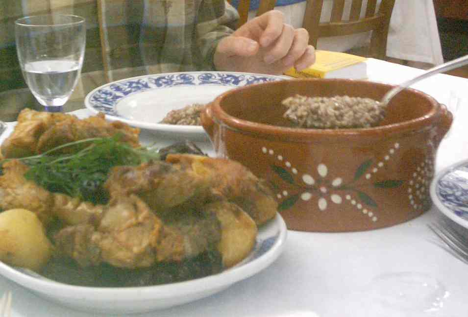 Rojões à moda do Minho com arroz de Sarrabulho, um prato português